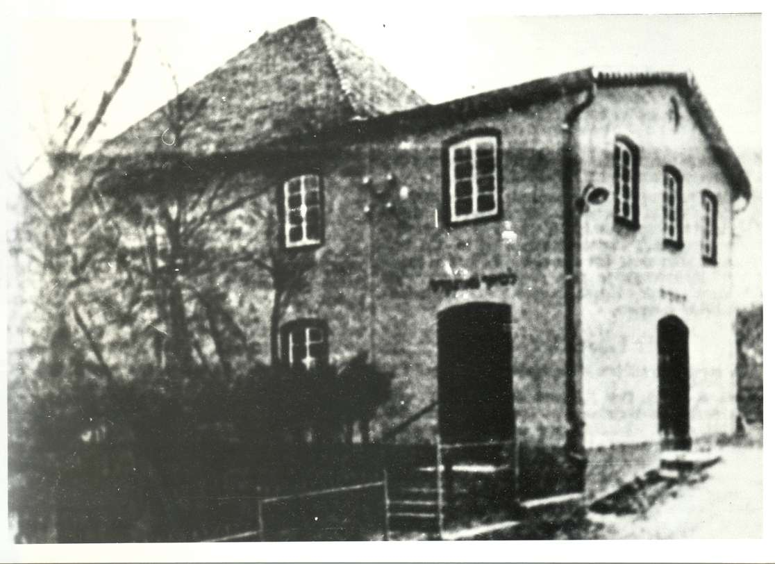 Synagoge (Buttenhausen) Nutzungsbedingungen ausdrücklich auch für Wikipedia (siehe: [1]